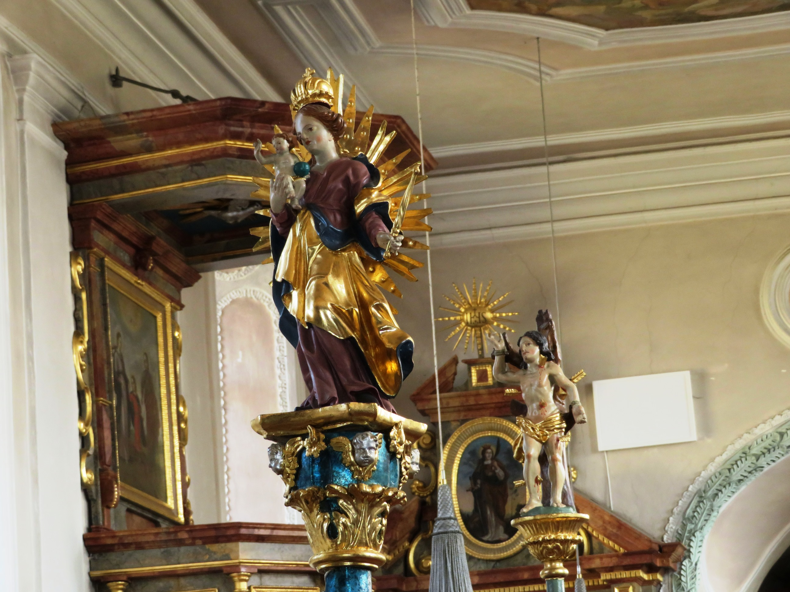 Vortragefigur